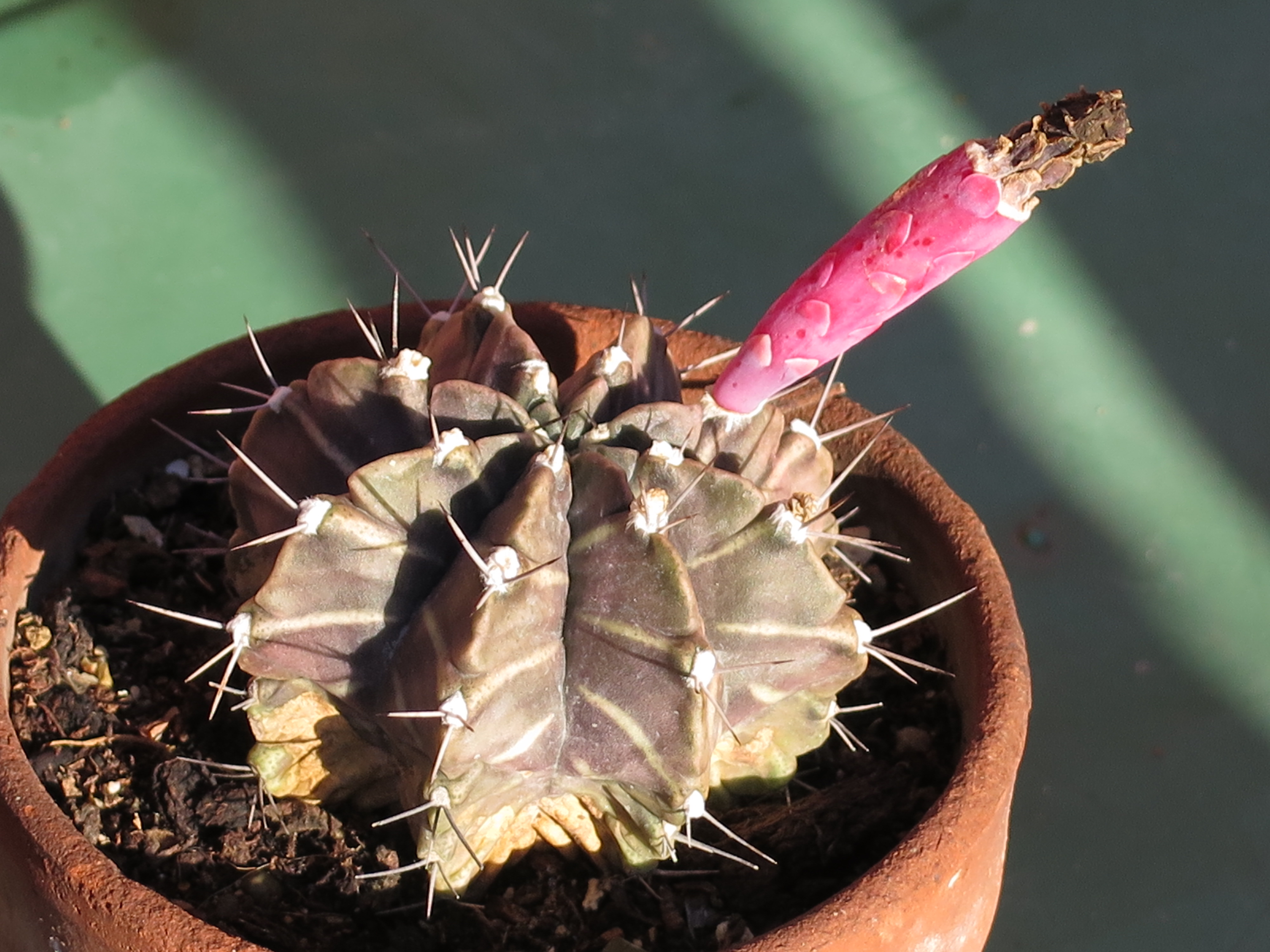 Gymnocalycium mihanovichii con frutto